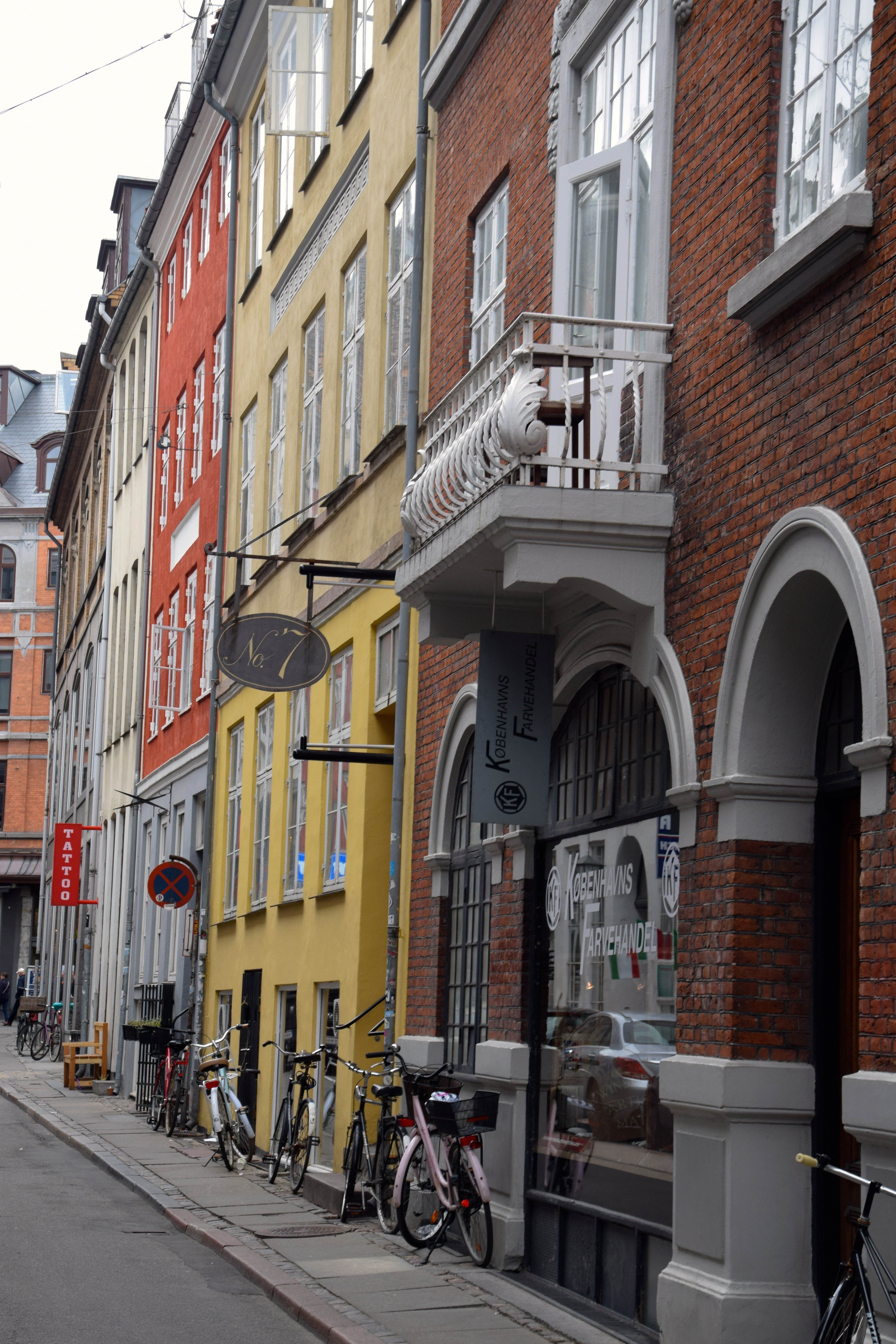 Badstuestræde in Copenhagen, Denmark